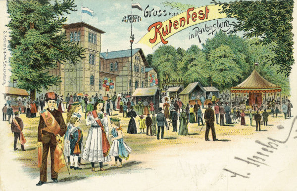 Ansichtskarte vom Rutenfest Ravensburg (mit der alten Kuppelnauturnhalle)